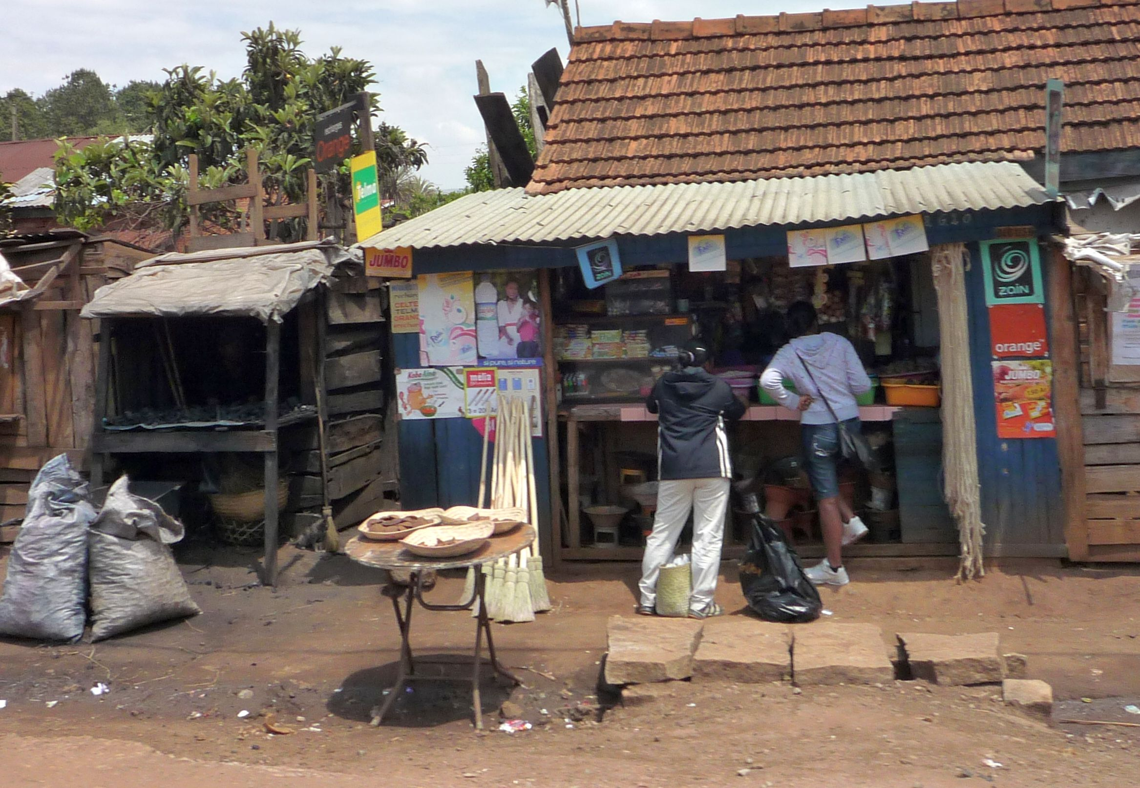 Street Stall